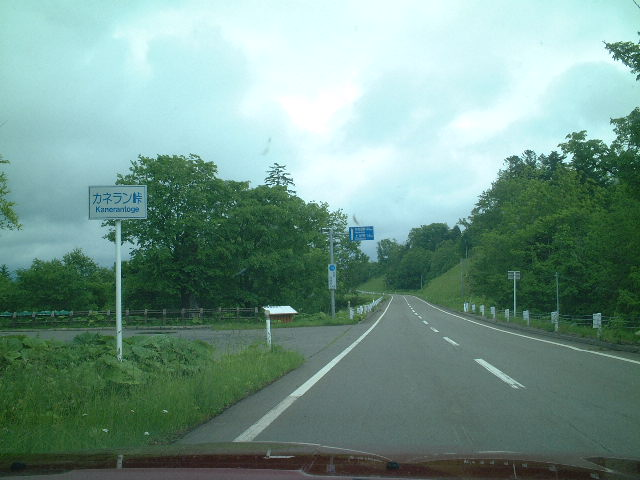 道道143号（カネラン峠）を撮影。